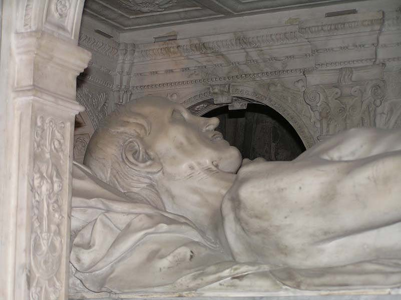 Saint-Denis (Île-de-France), basilique nécropole royale, gisant de Louis XII, roi de France, aux côtés de son épouse Anne de Bretagne, à l'étage inférieur de leur tombeau.